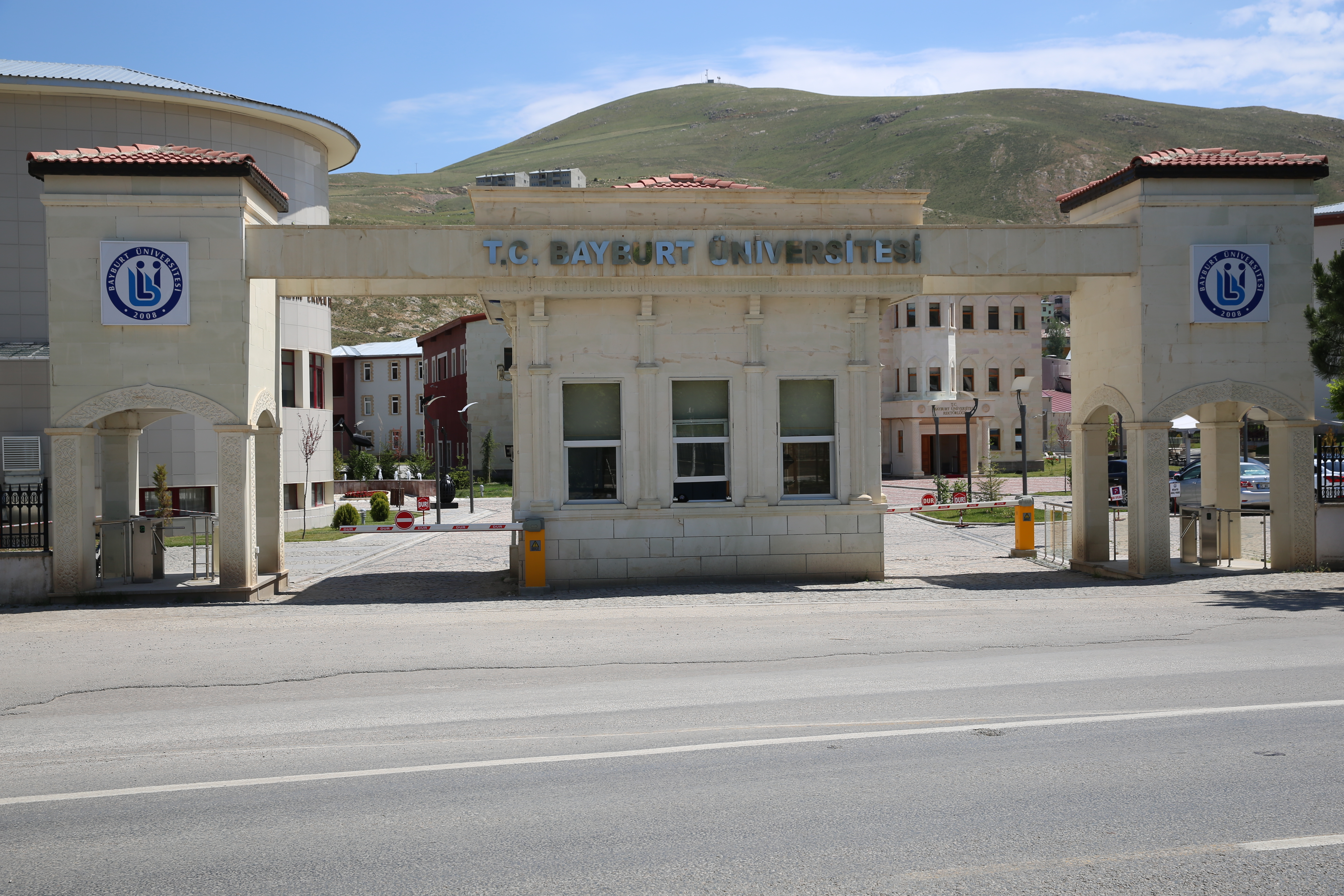 Bayburt Üniversitesi Giriş Kapısı